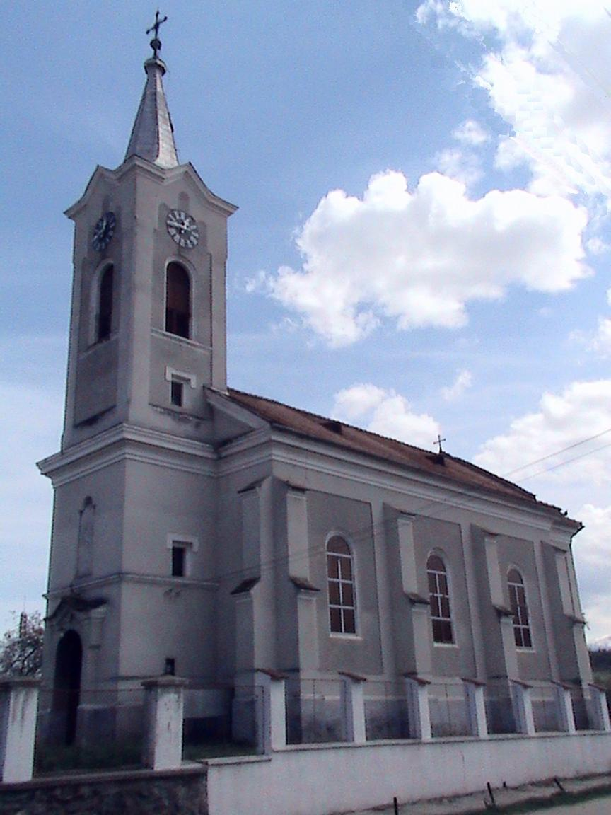 Biserica ortodoxă din comuna Racoviţa, Sibiu